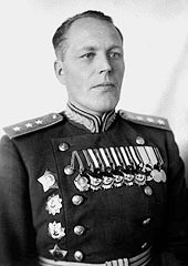 Владимир Захарович Романовский (1896 — 1967) — советский военачальник